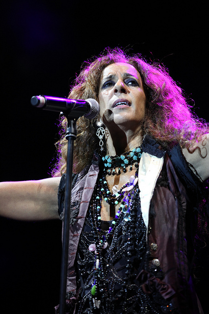 Rosario Flores durante un concierto en Fuenlabrada.